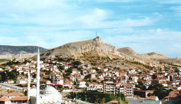 Česky: Hekimhan, Turecko. Pohled na město